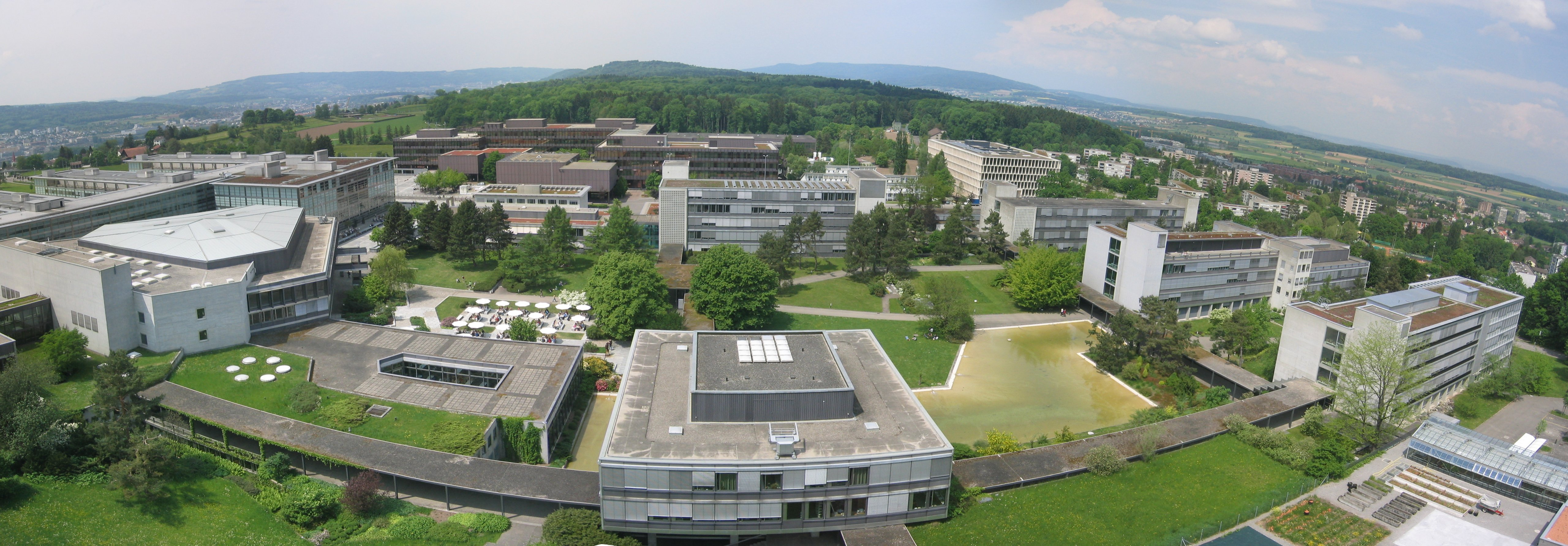 ETH Hönggerberg Campus